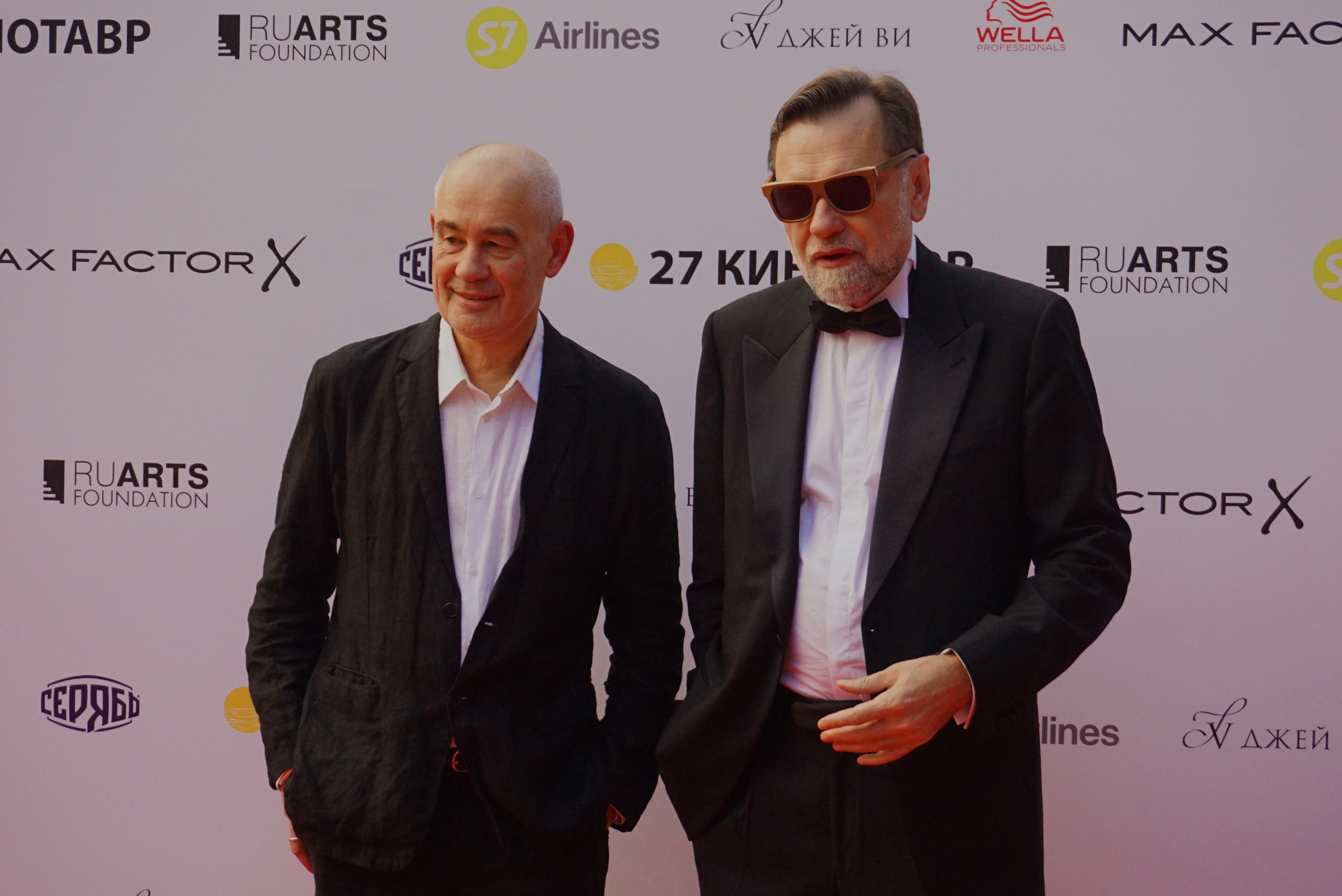 Серге́й Влади́мирович Бодро́в (28 июня 1948 года, Хабаровск) — советский и российский кинорежиссёр, сценарист, продюсер, отец актёра и кинорежиссёра Сергея Бодрова-младшего. Номинант на премию «Золотой глобус» и премию «Оскар». Серге́й Миха́йлович Селья́нов (род. 21 августа 1955, Олонец, Карело-Финская ССР, СССР) — российский кинорежиссёр, сценарист и продюсер. Кинотавр-2016, Сочи.